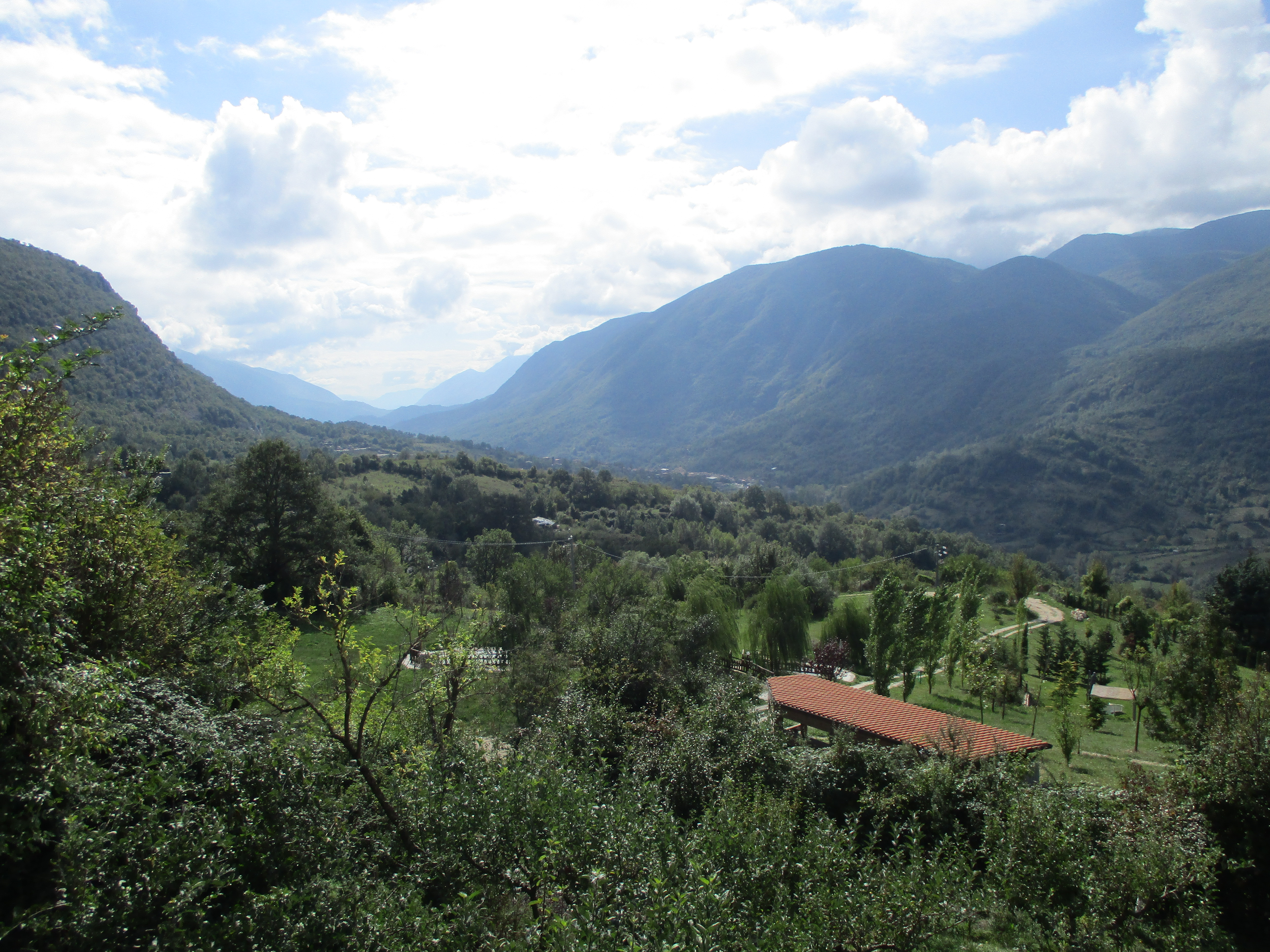 Panoramica della valle di Nerfa